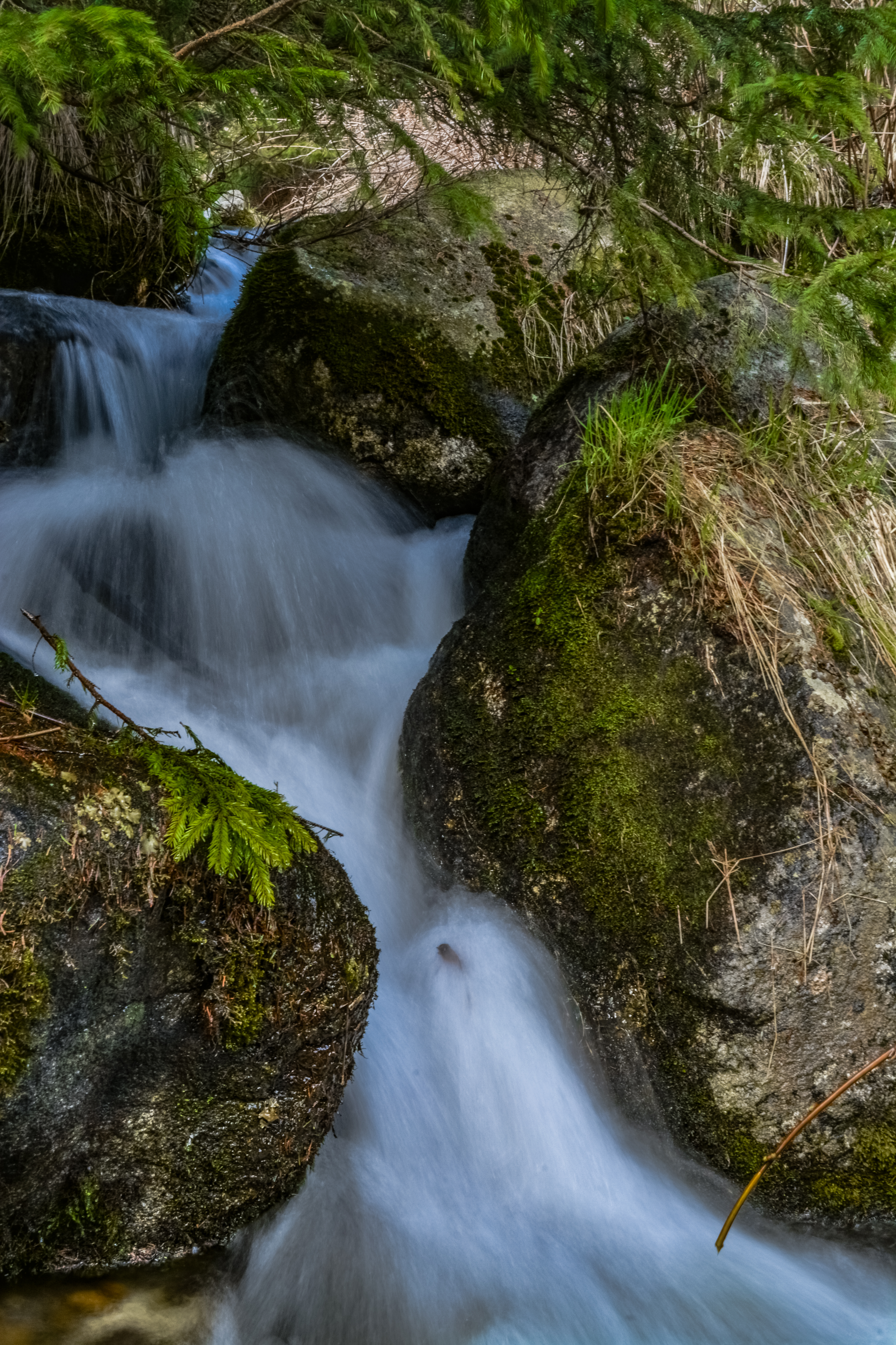 Potok Veľký Šum vo Vysokých Tatrách, severozápadne od osady Vyšné Hágy